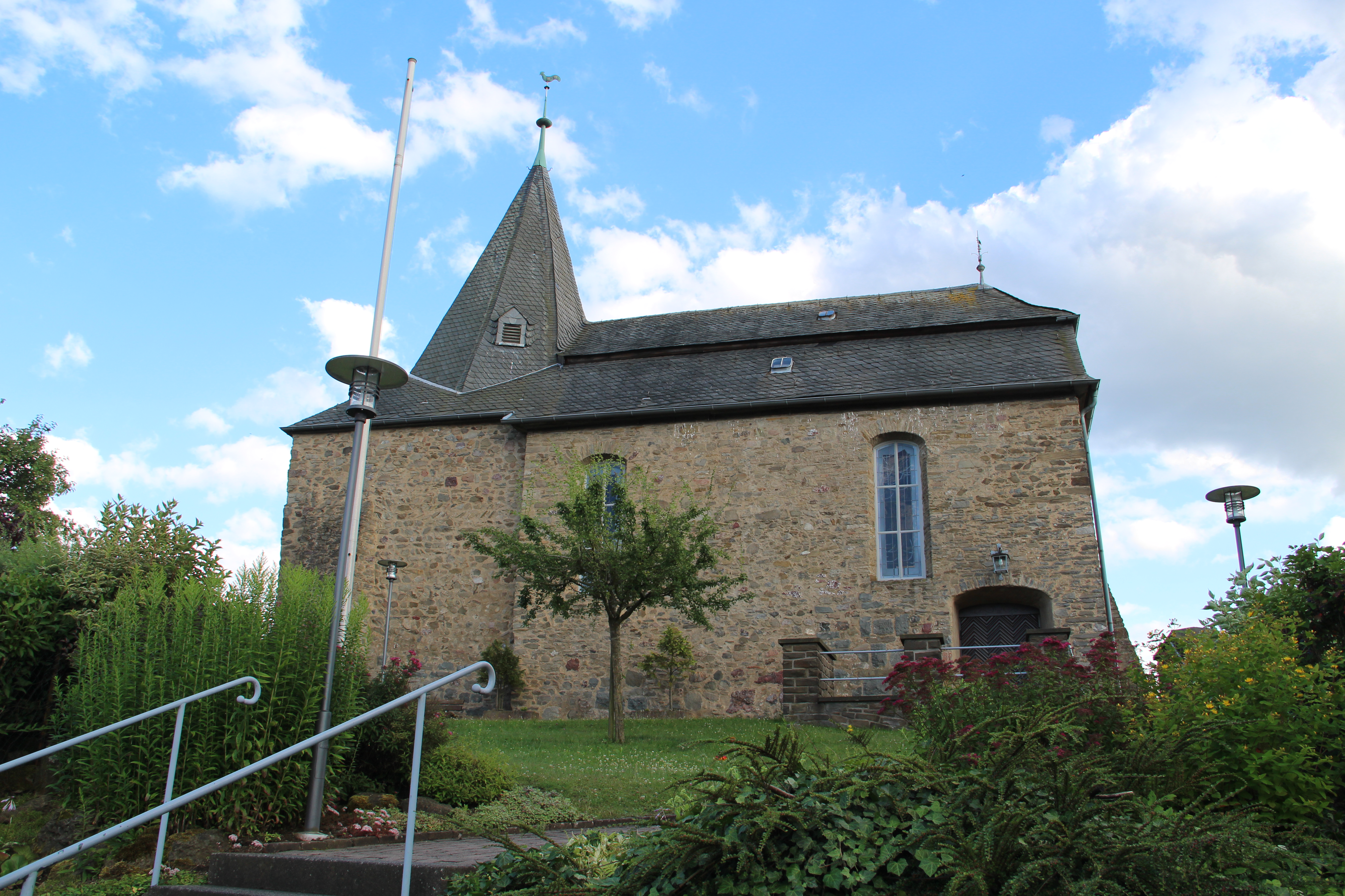 Günterod